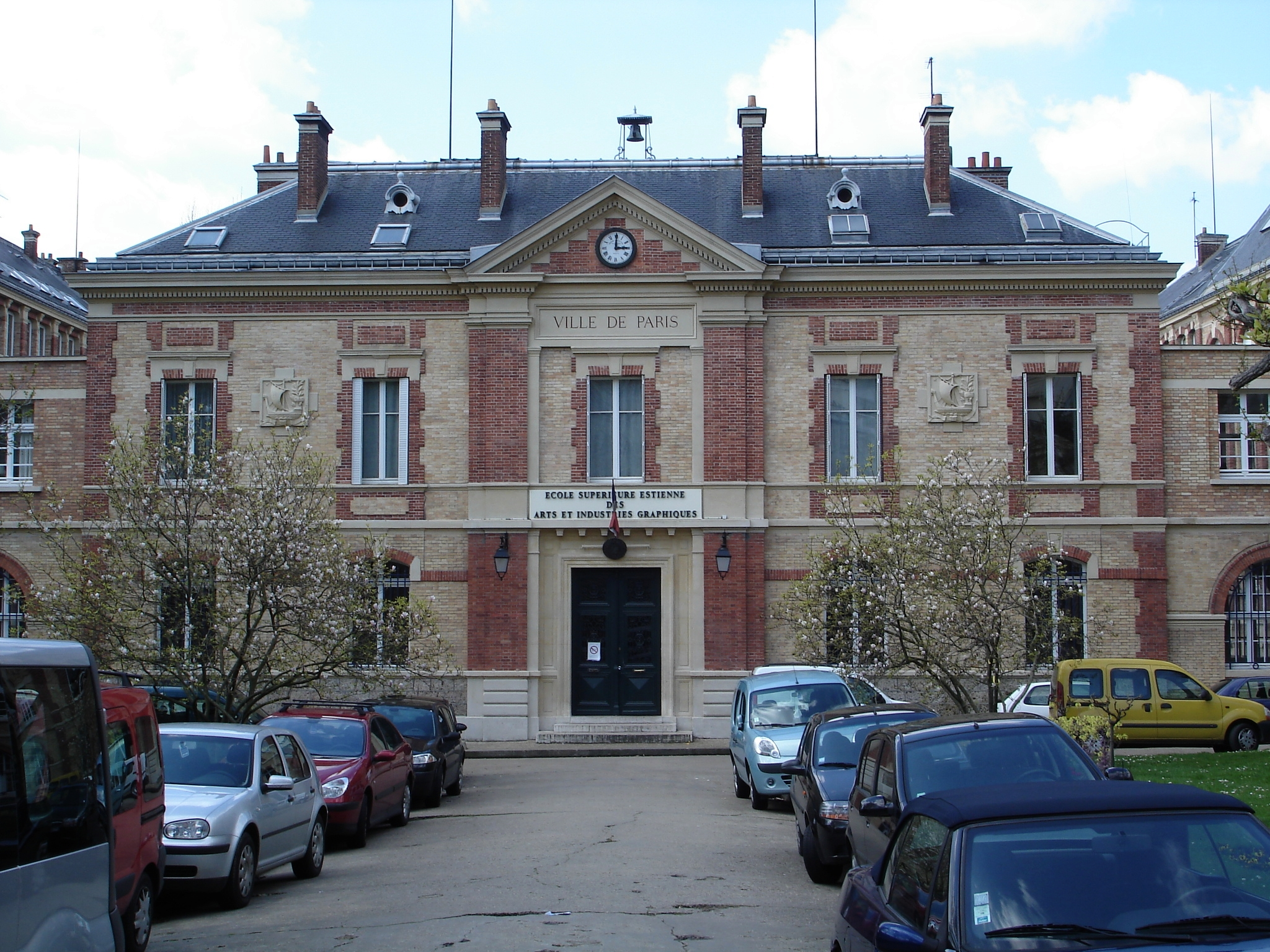 École Estienne des Arts et des Industries Graphiques. 8 Boulevard Auguste-Blanqui - Paris 13e